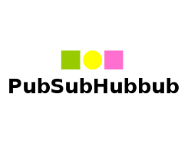 Логото на Pubsubhubbub протокола